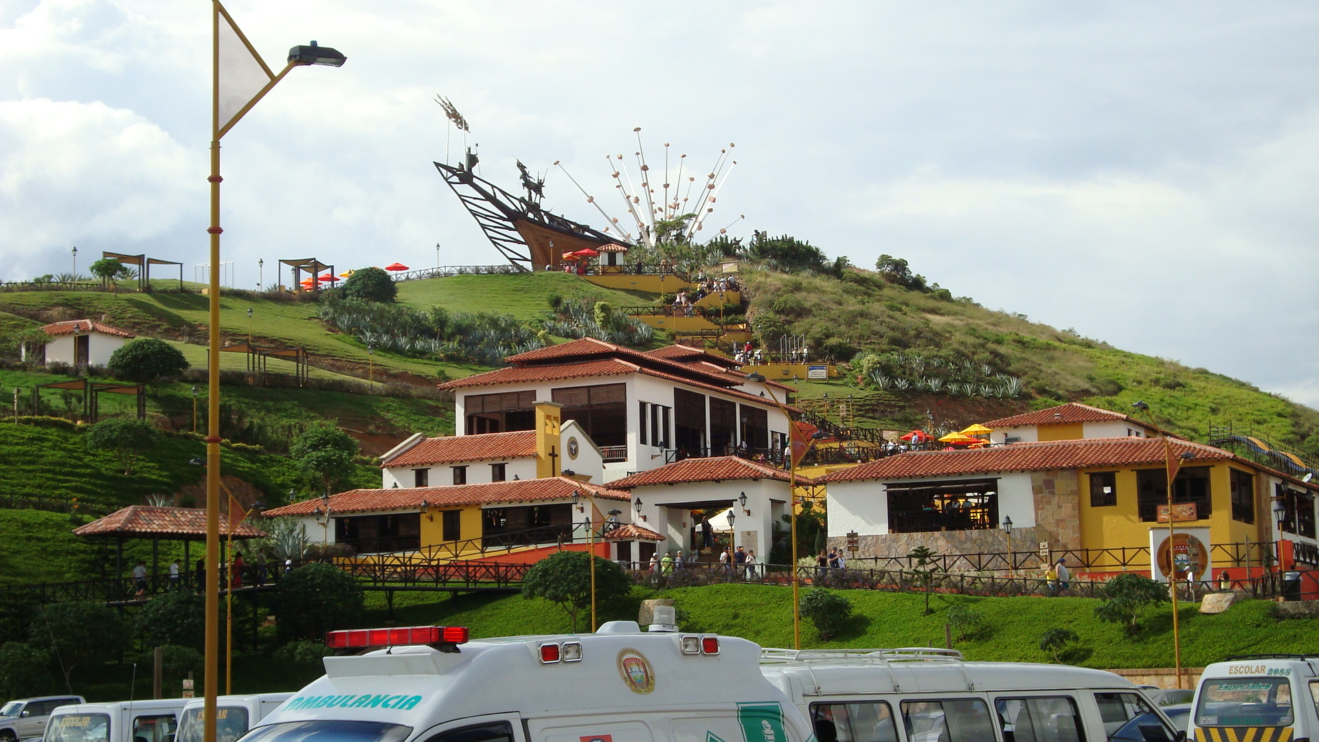 Panachi